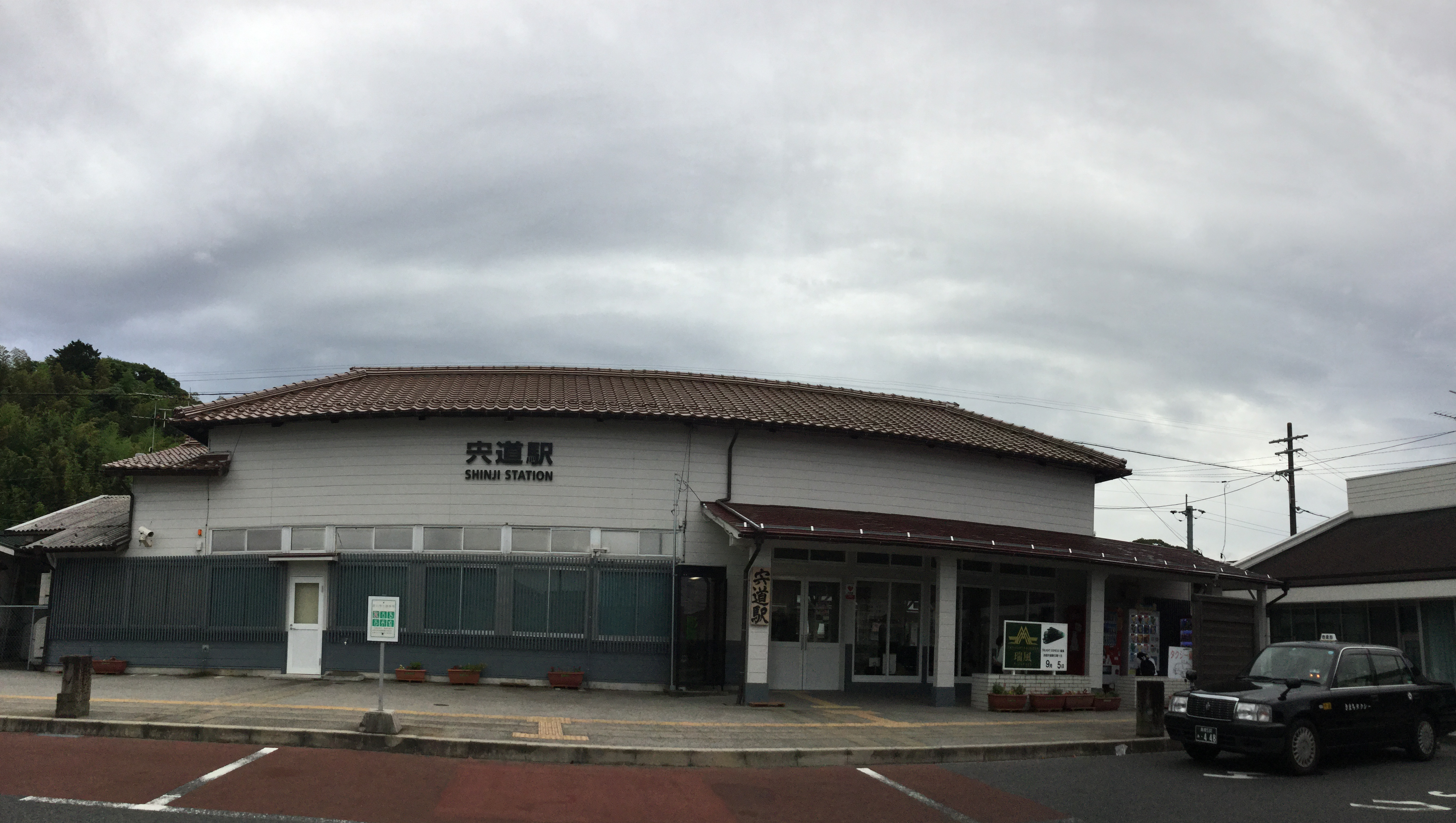 Shinji Station (宍道駅)